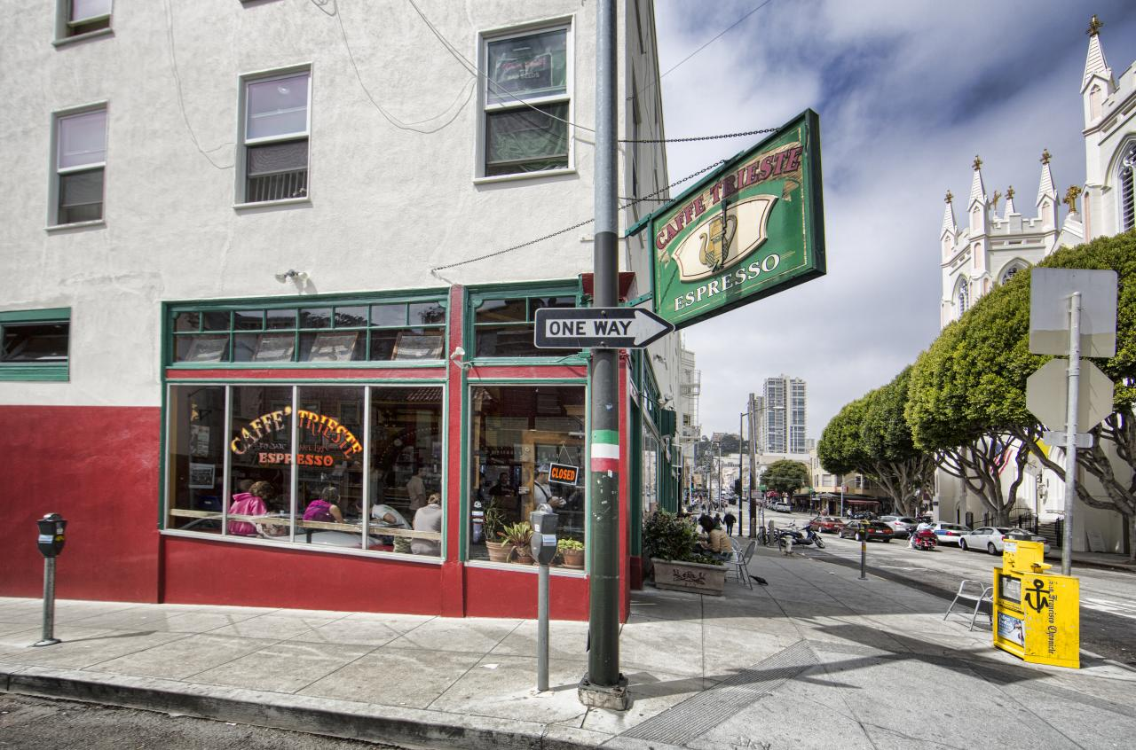 caffe trieste